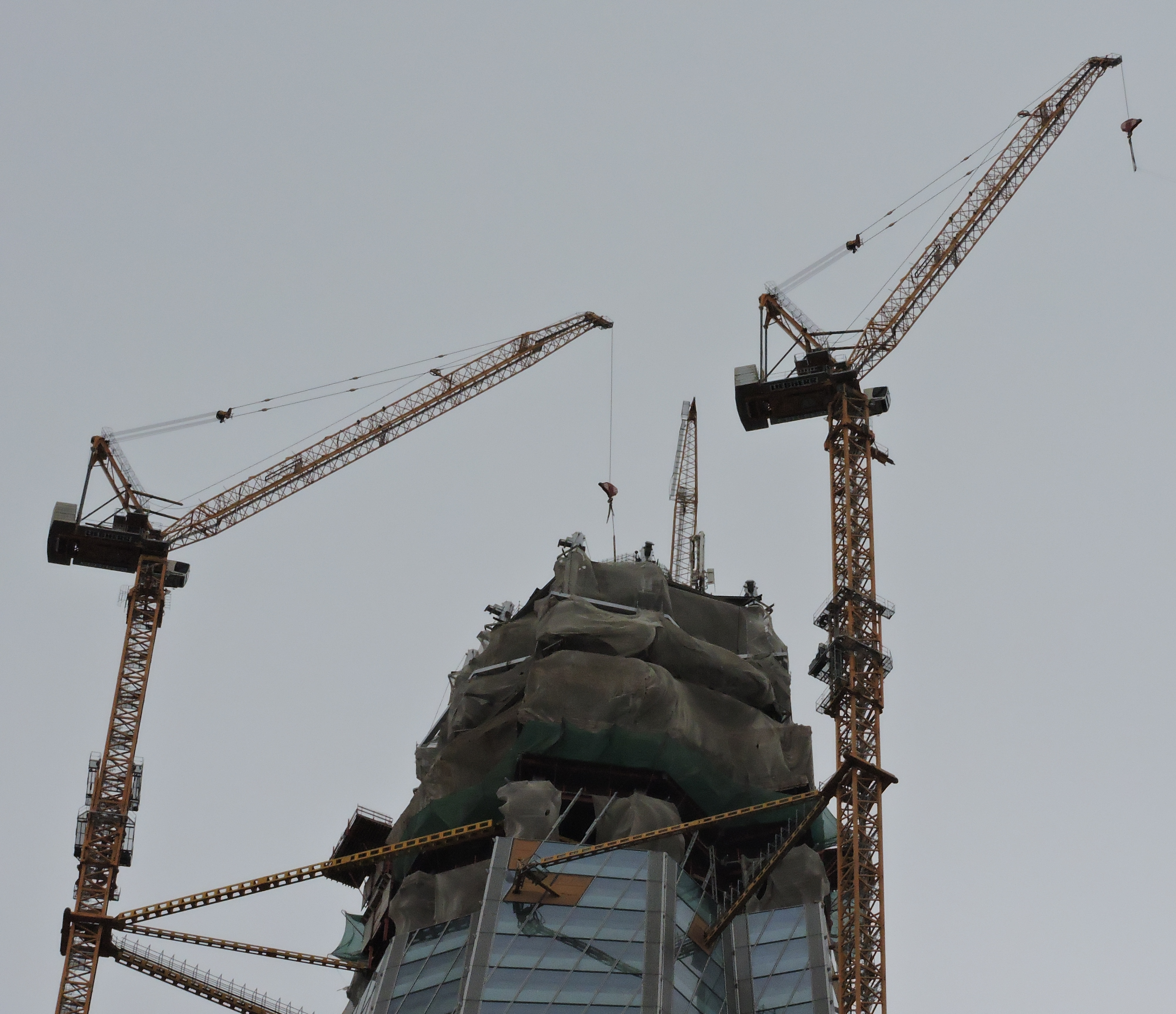 Башенные краны прикреплены к зданию аутригерами